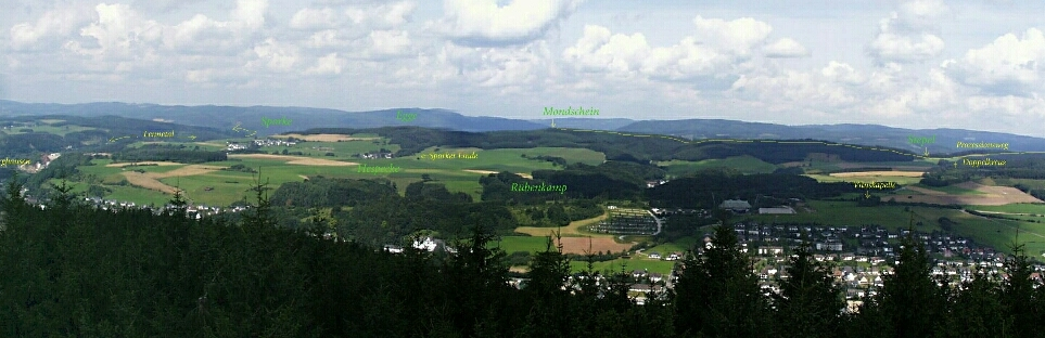 Blick vom Wallburgturm auf dem Weilenscheid auf Elspe, Lennestadt, Nordrhein-Westfalen, Deutschland